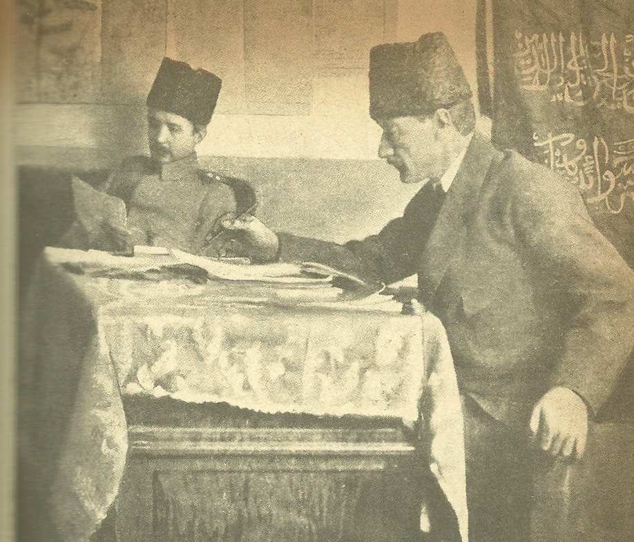 Atatürk ve İnönü Kurtuluş Savaşı esnasında cephe karargahında çalışırlarken.